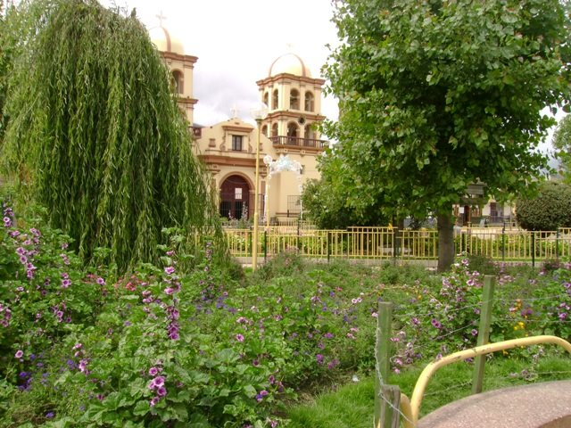 IglesiaDesanPedro